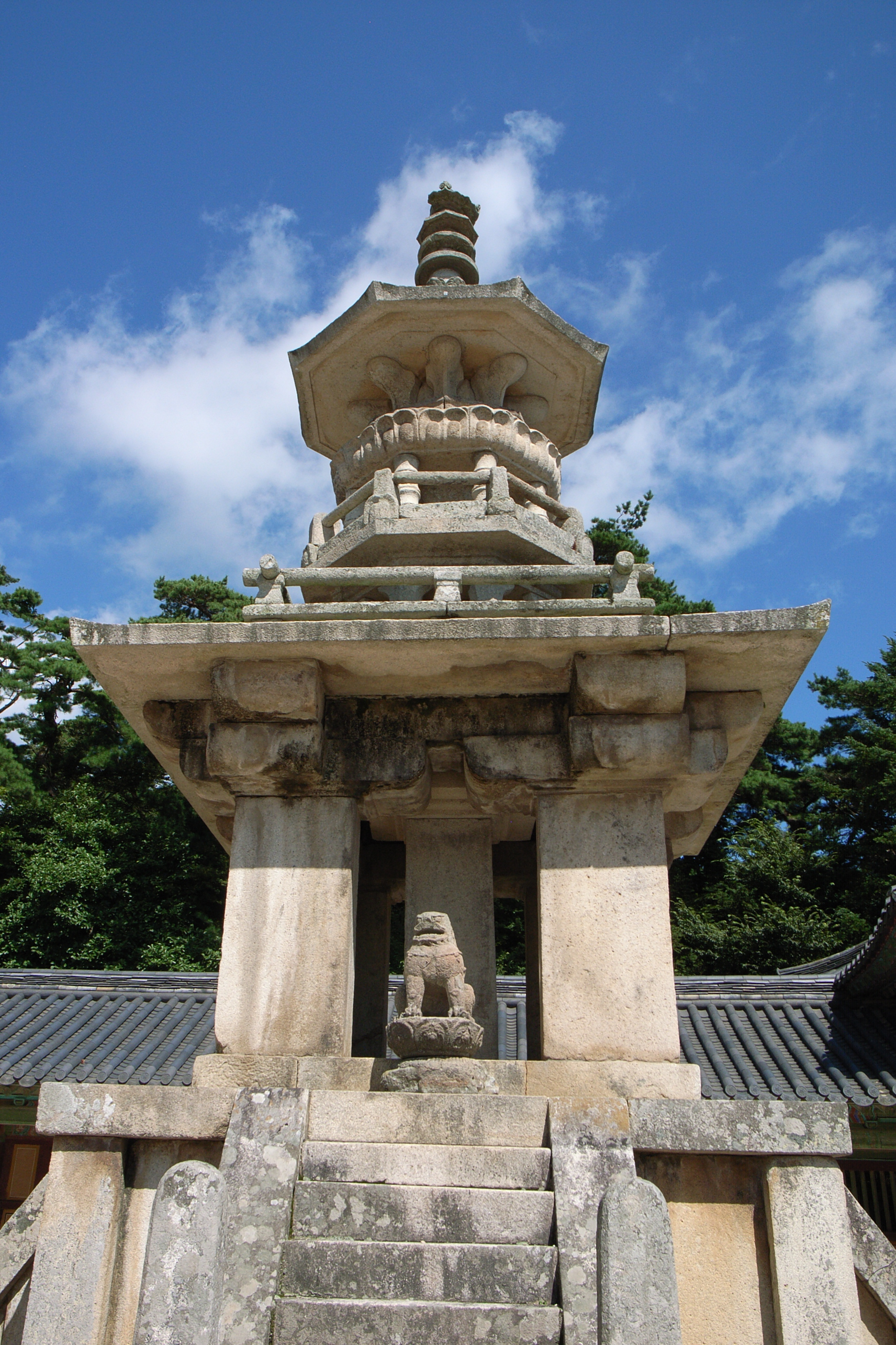 Dabotap Pagoda